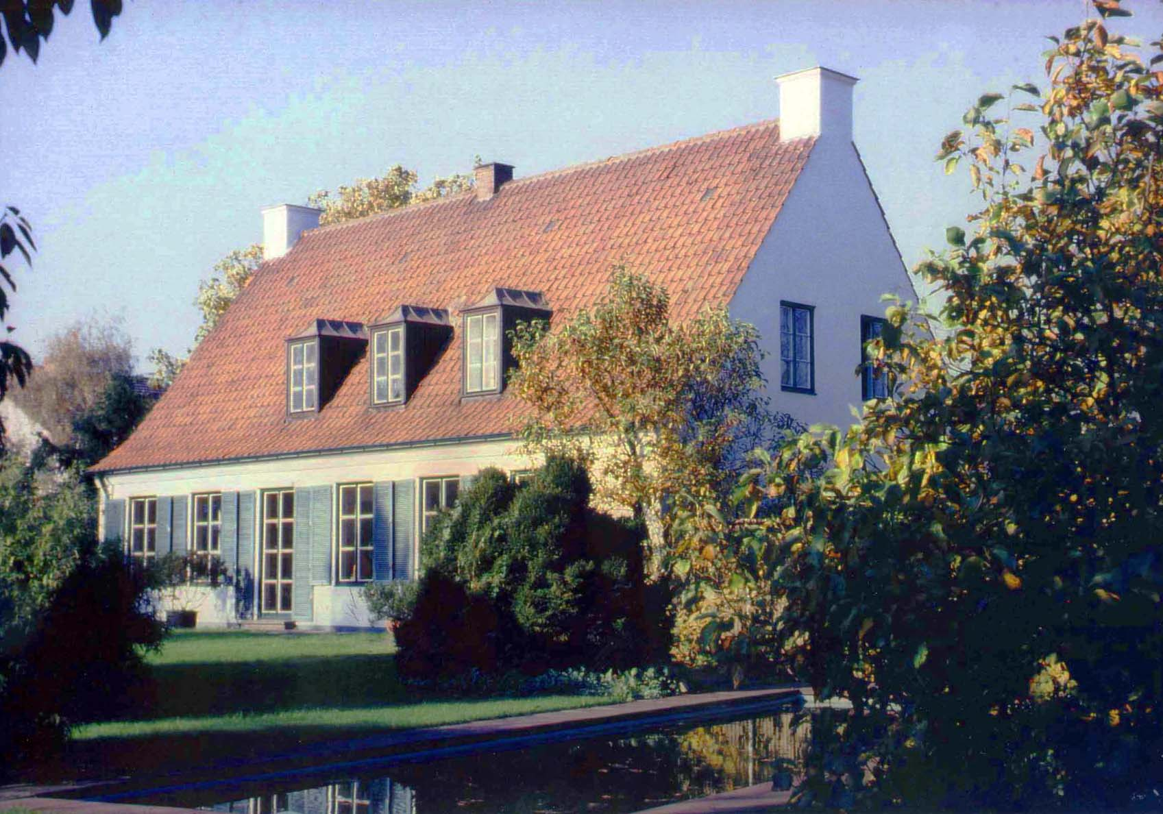 Gärtnerhof Schaub mit Gartenanlage des Landschaftsarchitekten BDLA Friedrich Schaub 1982, Erstling von Architekt Heiko Folkerts von 1953